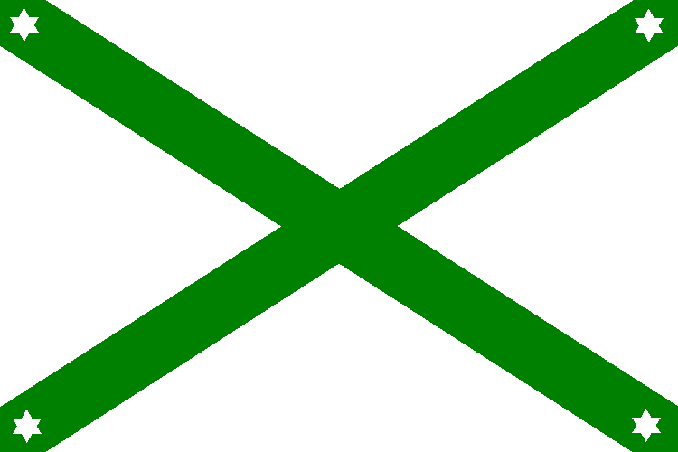 Bandera Municipal de Navahermosa (Toledo)